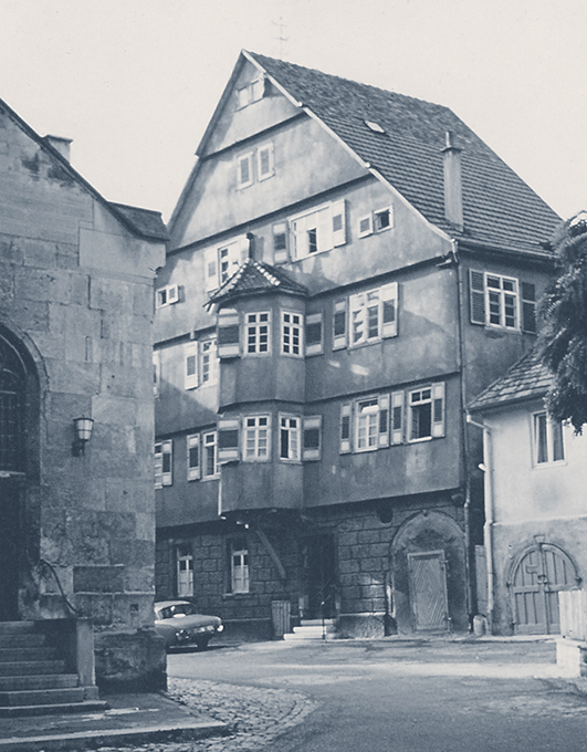 Der Kirchplatz in Markgröningen um 1970